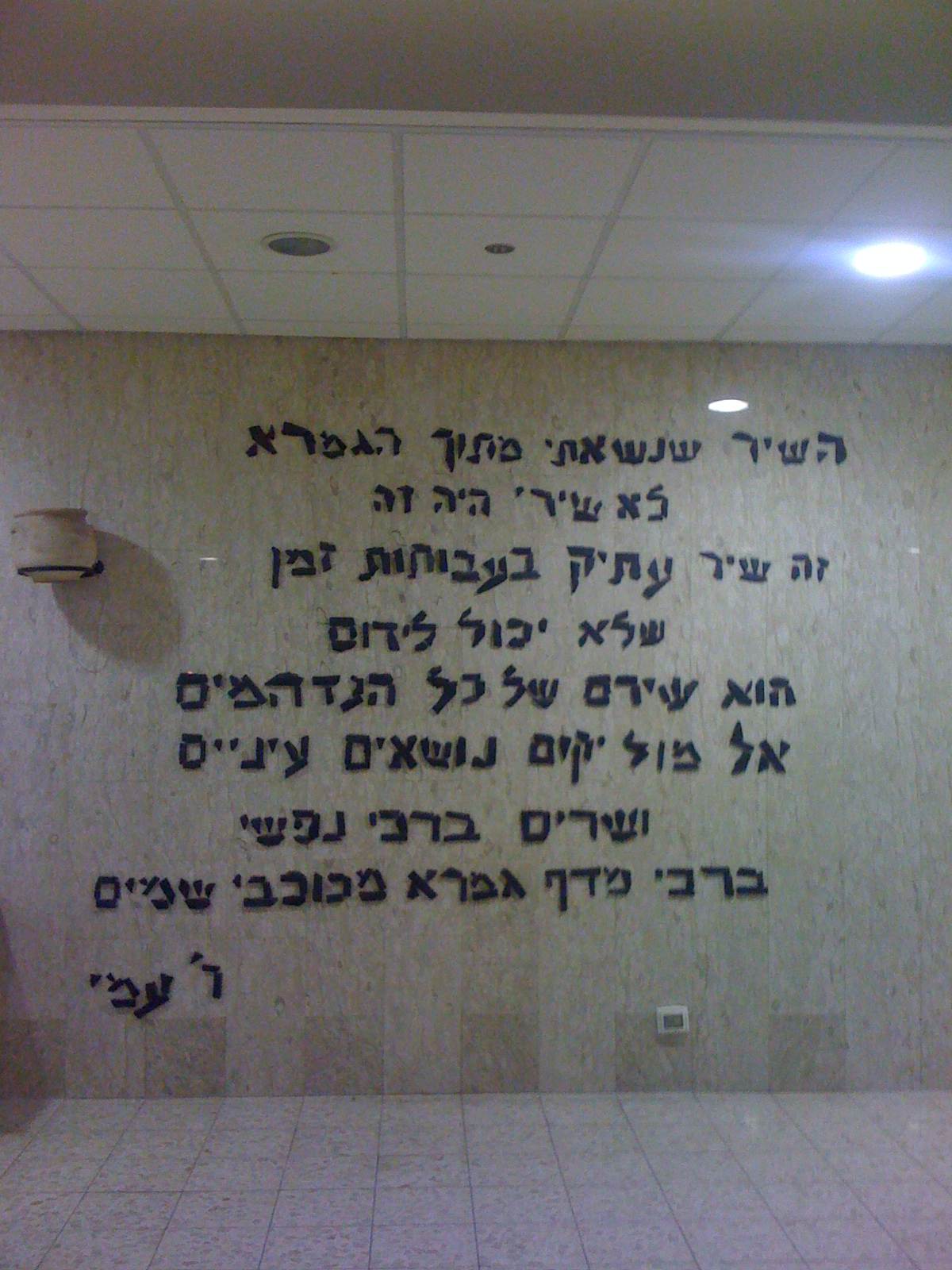 השיר של הרב עמי עולמי בכניסת לישיבת עתניאל.